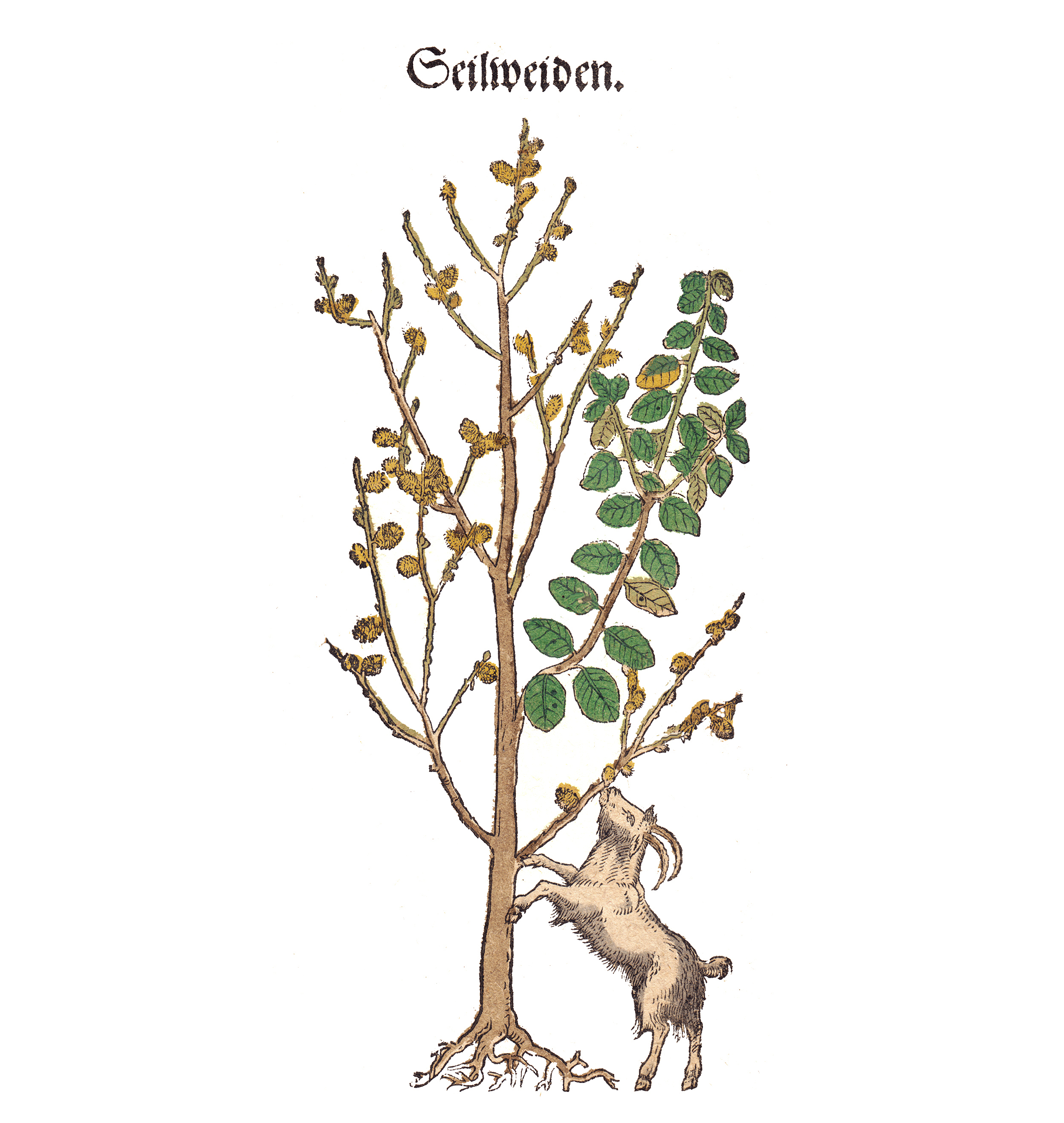 Abbildung der Salweide (Salix caprea)